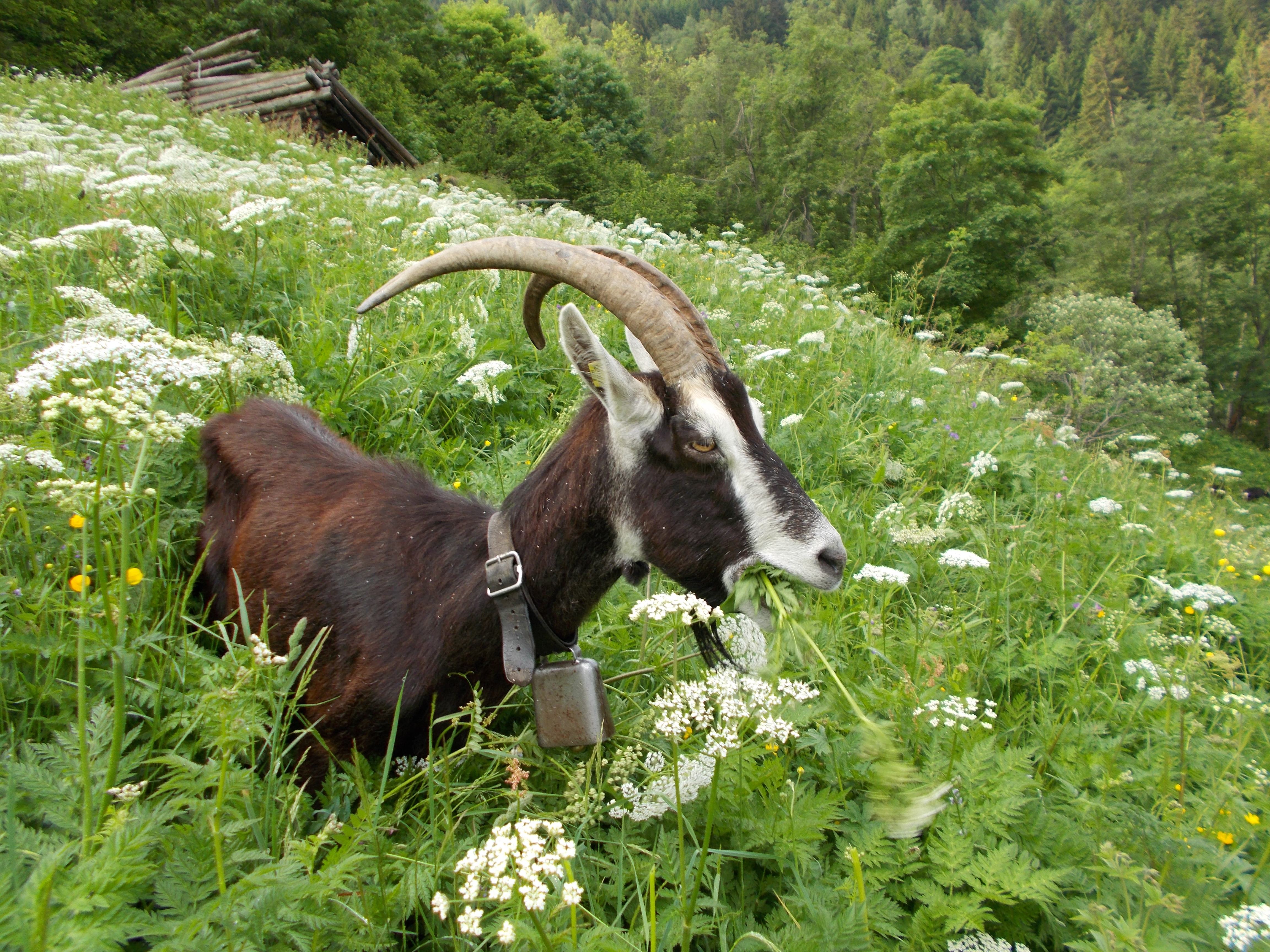 Fressen